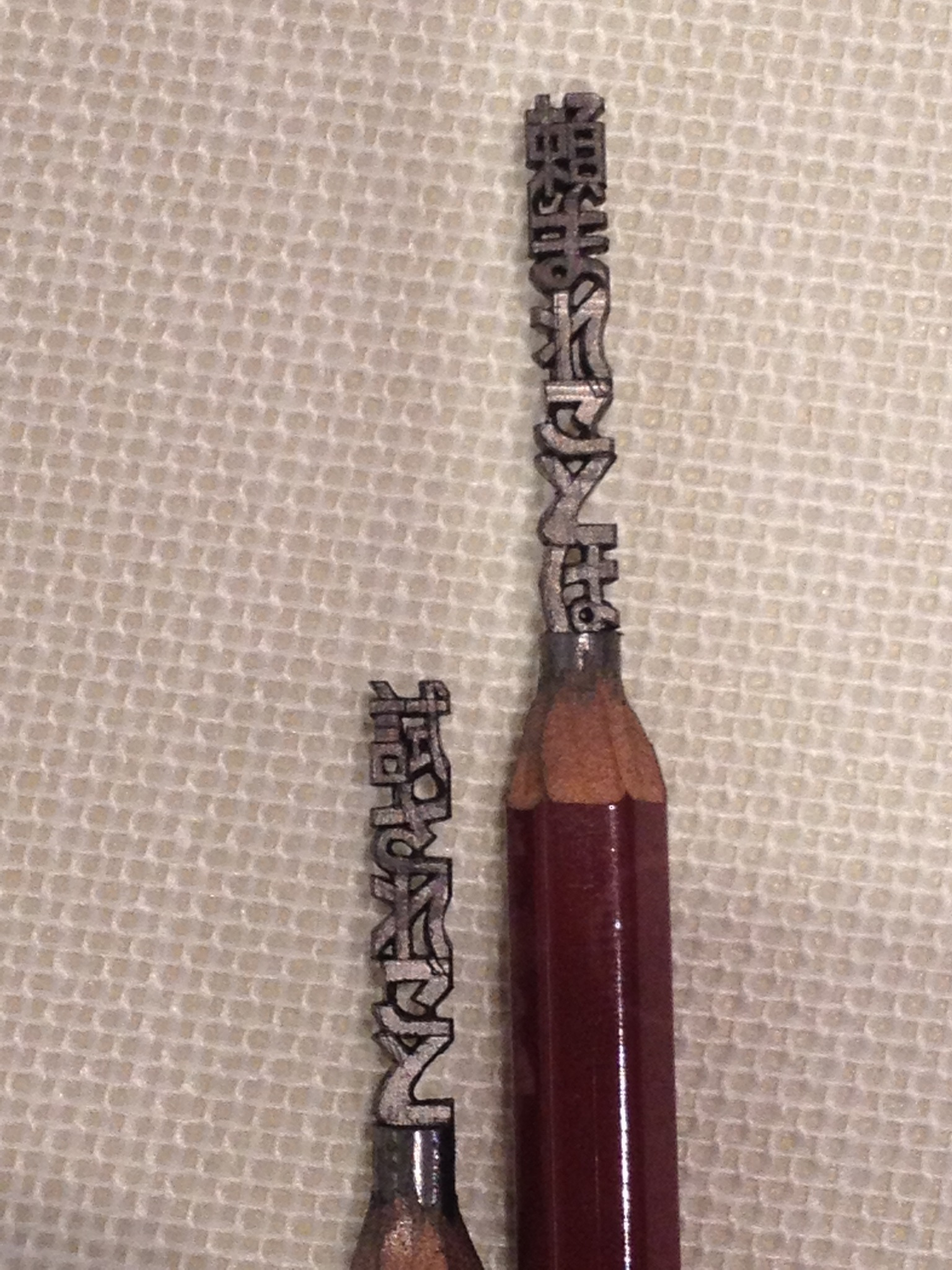 鉛筆彫刻 。pencil sculpting